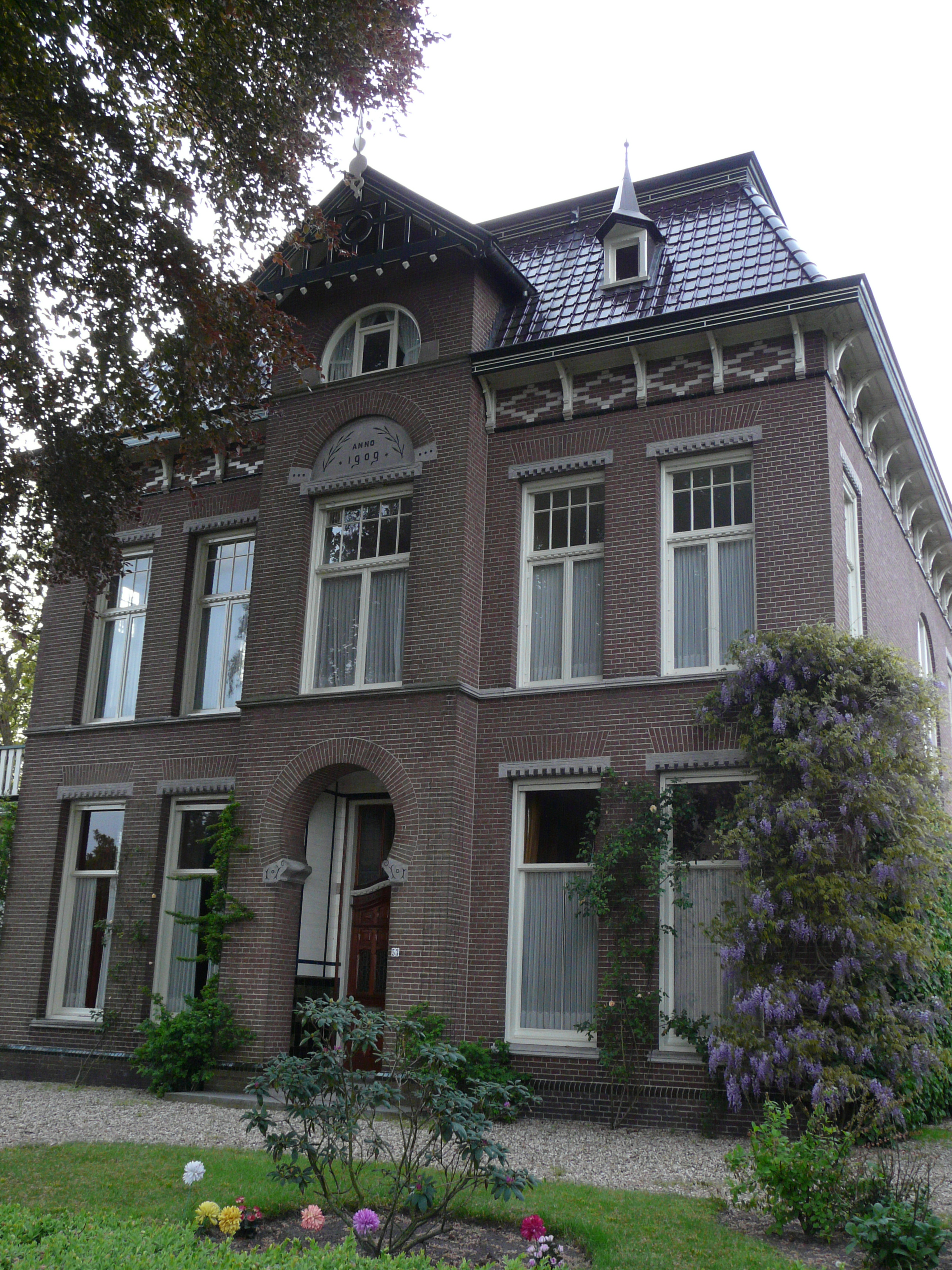 Staphorst